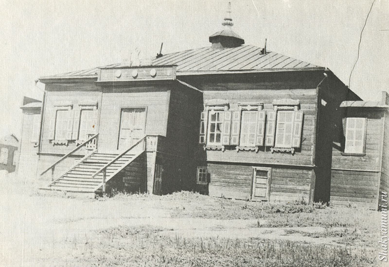 Фото 1929 года